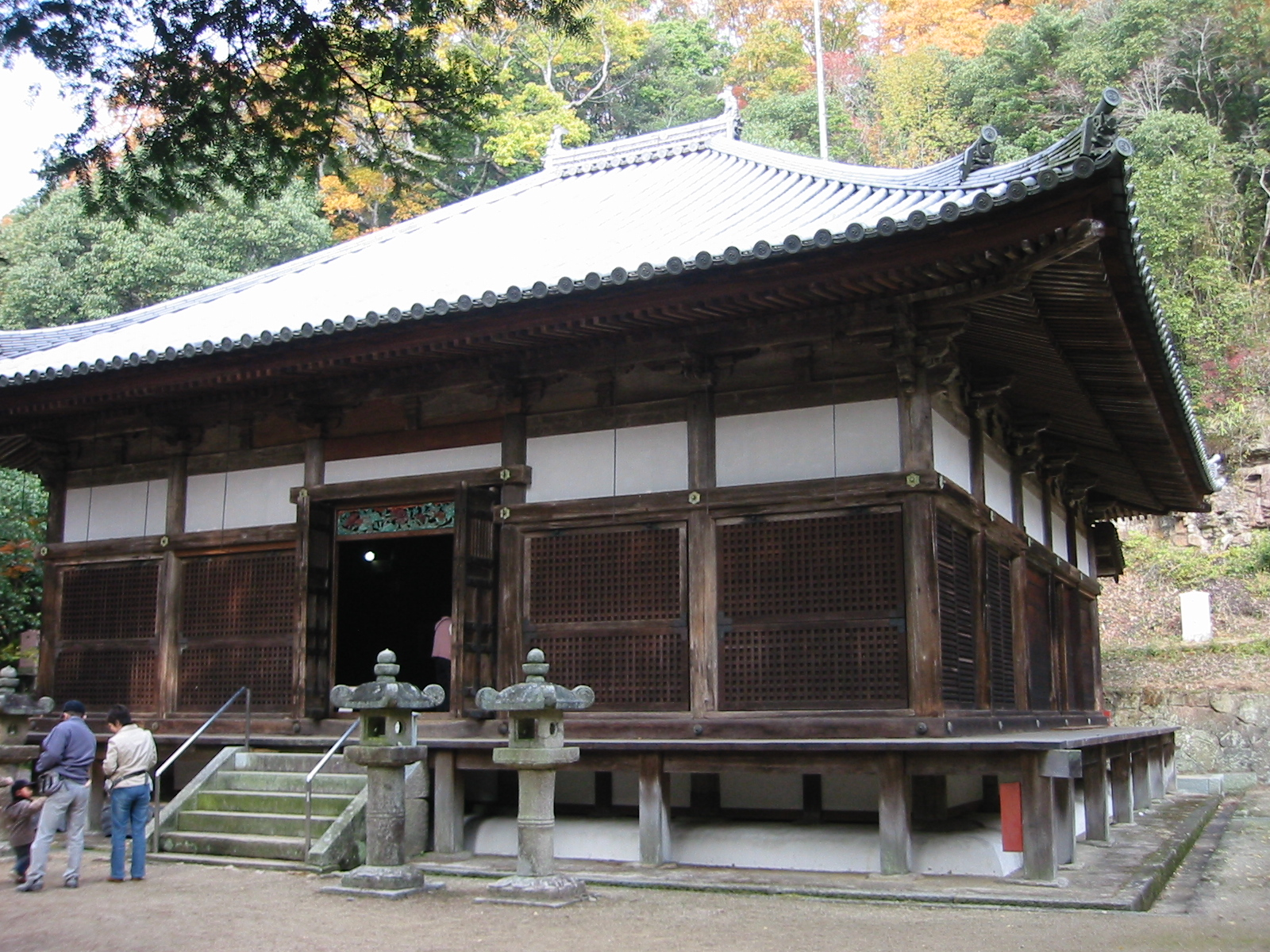 大谿寺伽耶院 本堂